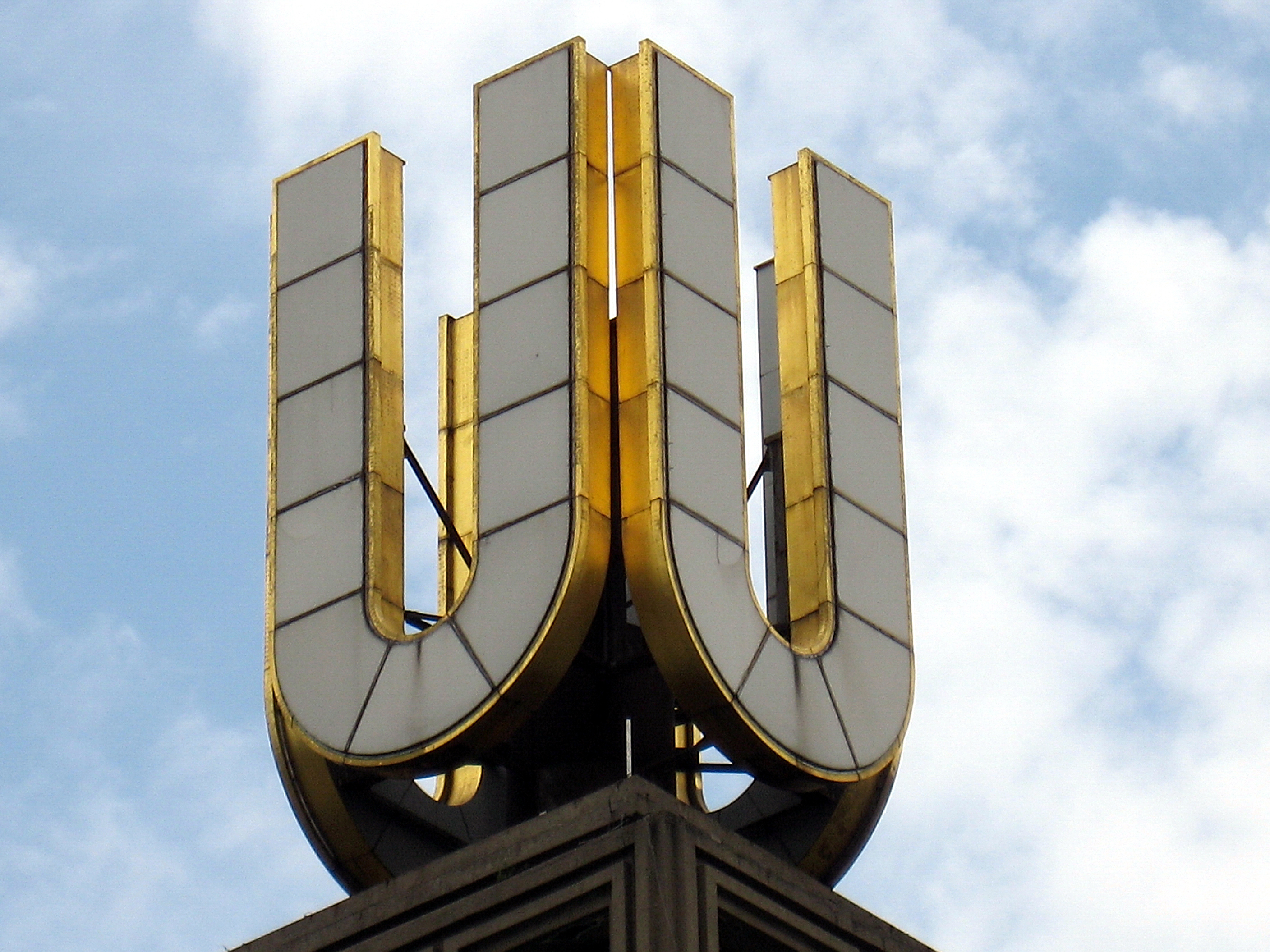 Dortmund, frühere Union-Brauerei, Brau- und Brunnen